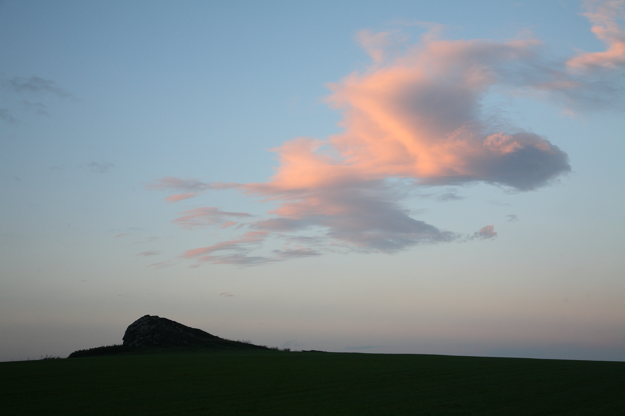 Die 562,5 Meter Höhe Erhebung „Weiße Frau“.